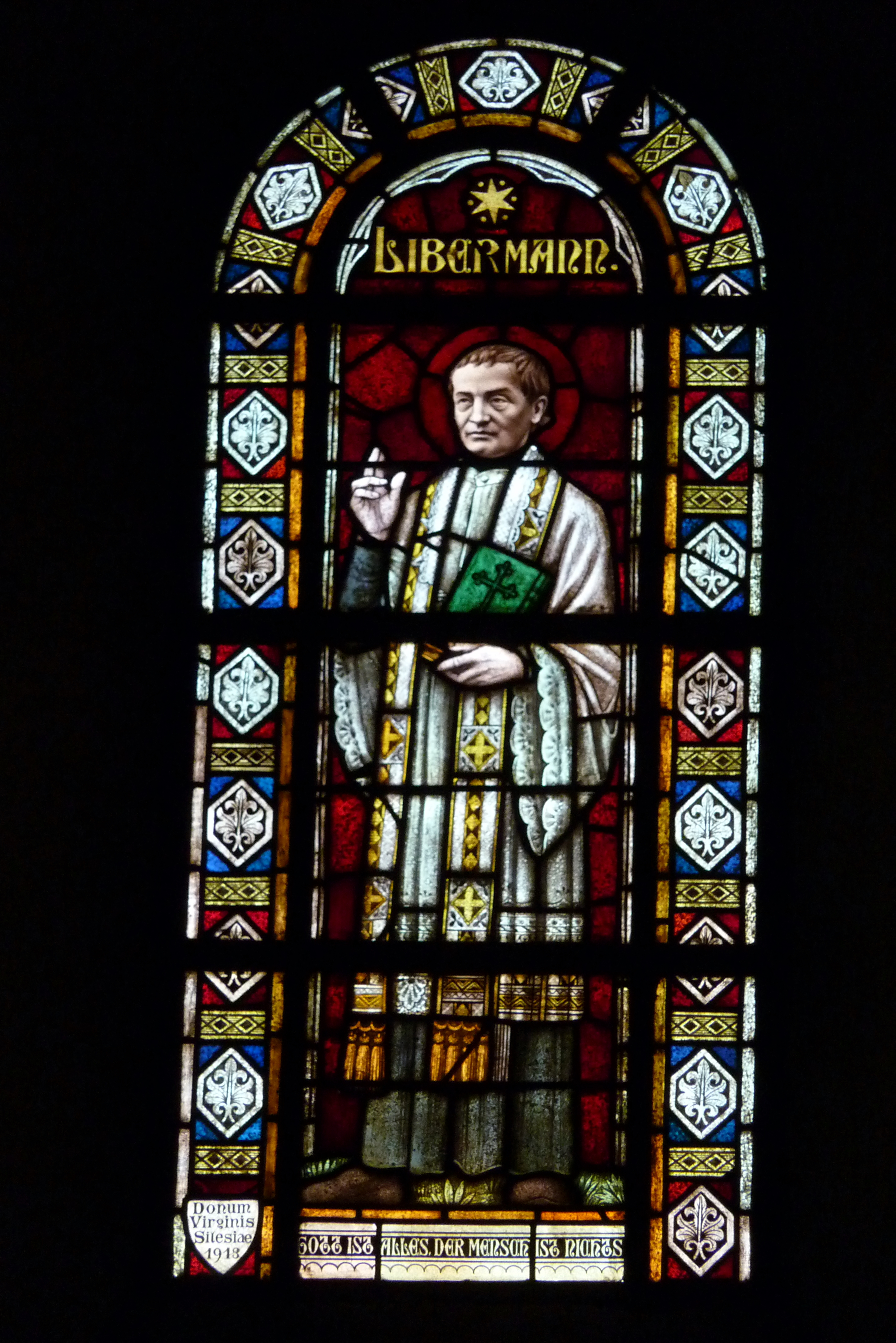 Katholische Kirche St. Maria Magdalena und St. Andreas des ehemaligen Prämonstratenser-Klosters Knechtsteden in Dormagen im Rhein-Kreis Neuss (Nordrhein-Westfalen), Bleiglasfenster im Langhaus von 1913, Darstellung: François Libermann